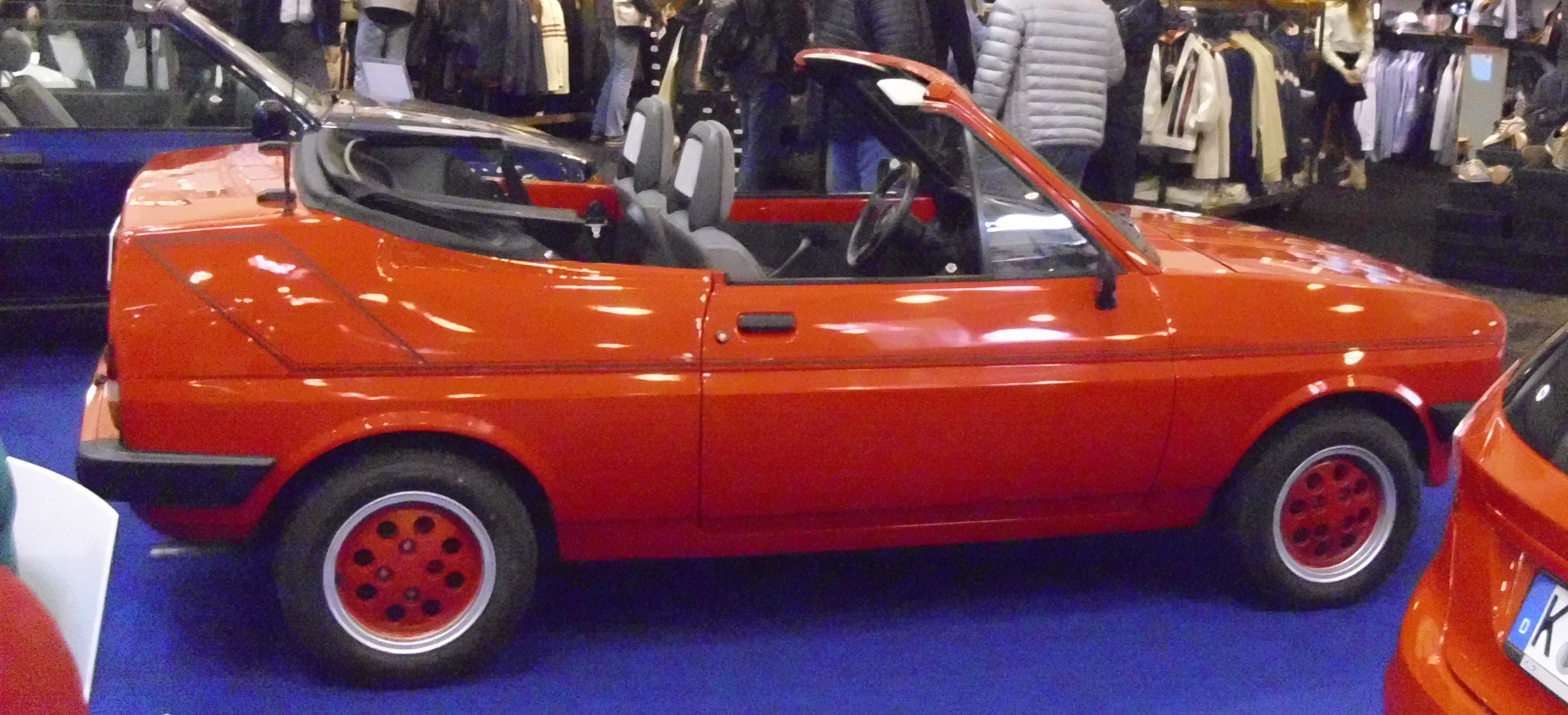 Ford Fiesta Cabriolet-Umbau von Bieber 1982 (Umbau 1990)